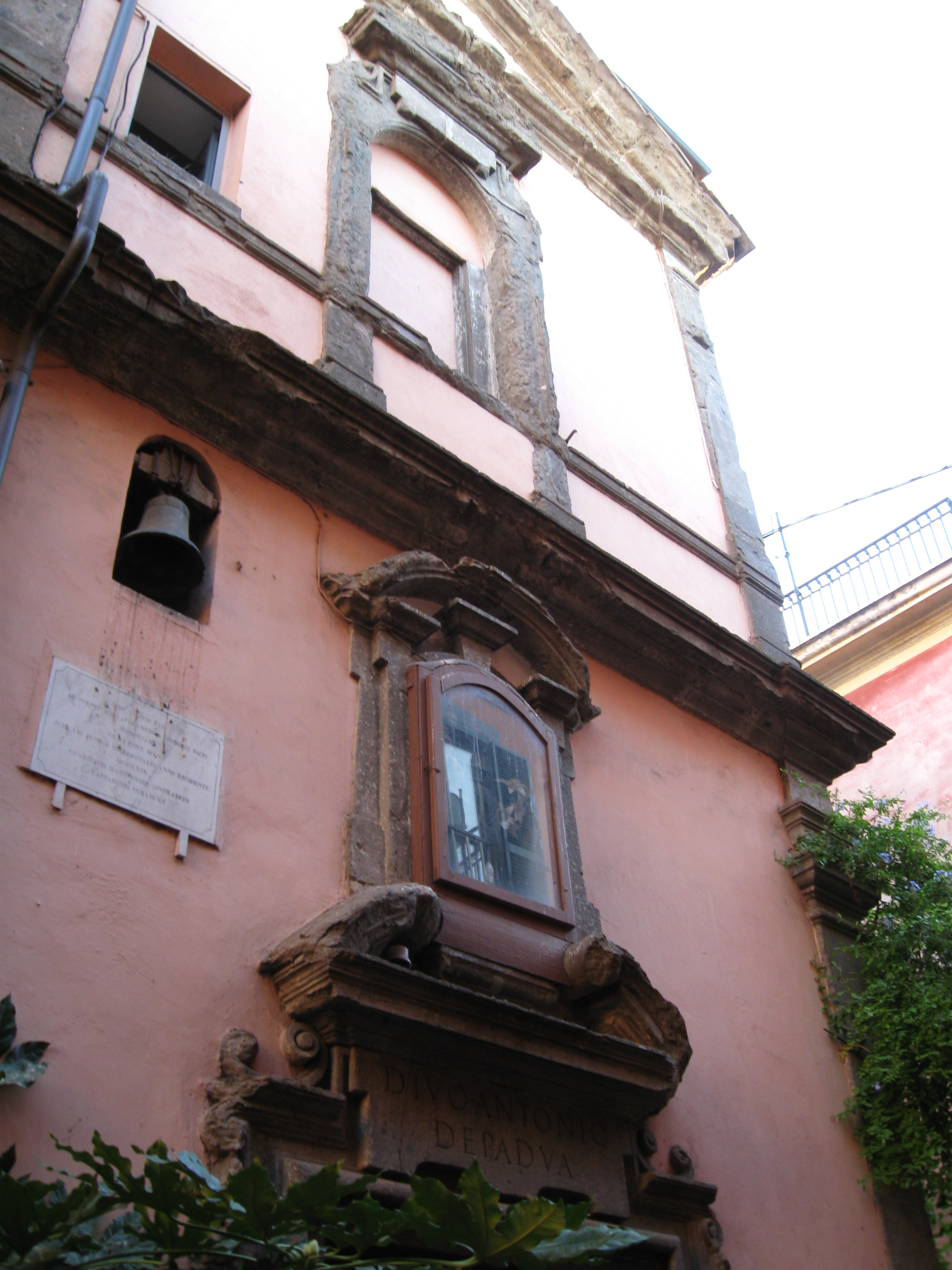 La Chiesa di Sant'Antonio da Padova a Marino (RM)